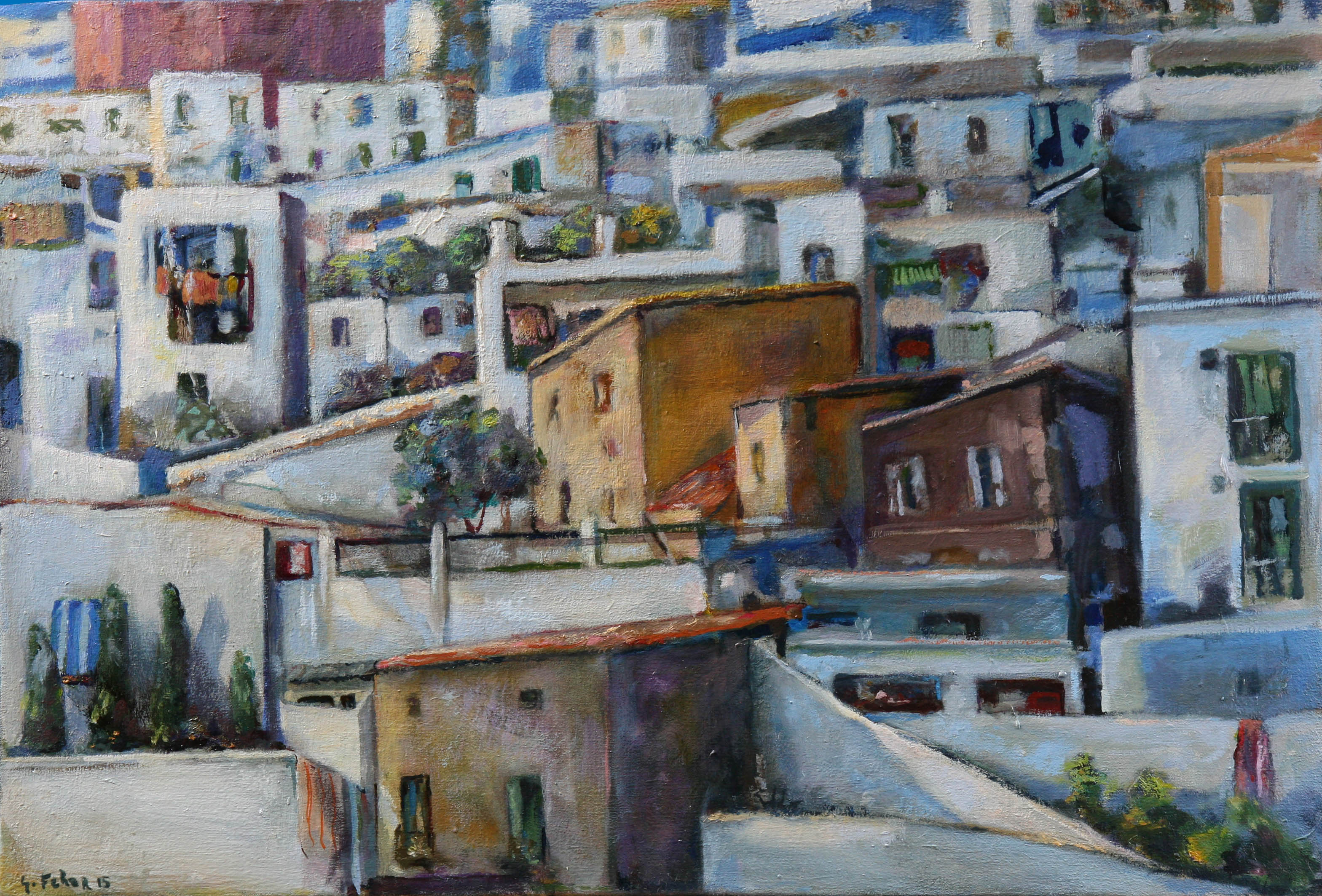 tableau